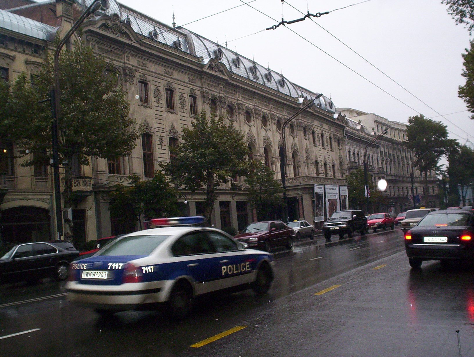 Rustaveli Ave. Tbilisi, Georgia